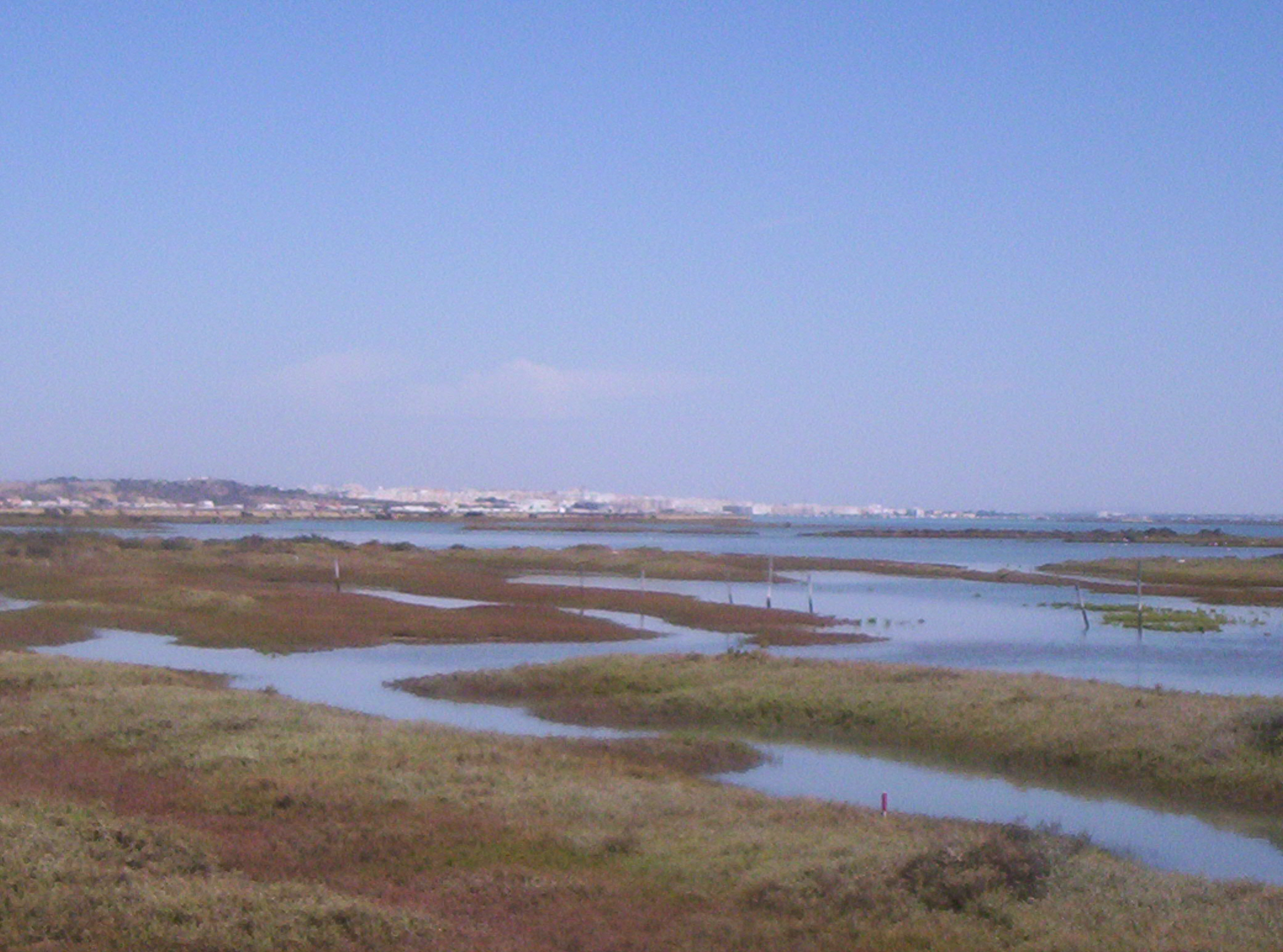 Foto del caño de Sancti Petri (Cádiz, España) con la localidad de San Fernando (Cádiz, España) al fondo.